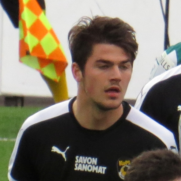 Charles Trafford, kanadalainen jalkapalloilija Kuopion Palloseuran joukkueessa kaudella 2015.